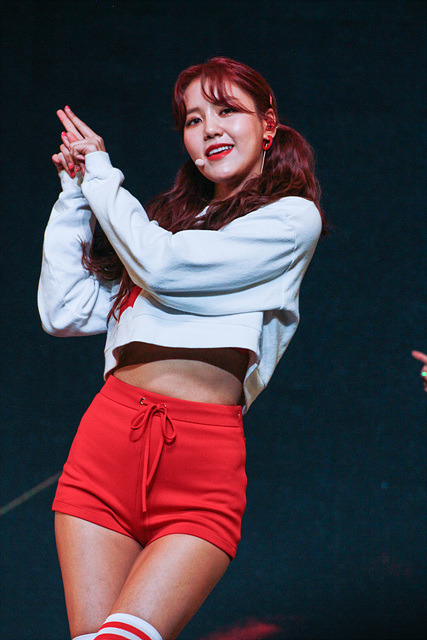 180528 AOA 5th 미니 앨범 컴백 쇼케이스 혜정 (4)